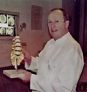 Farbfoto von Prof. Wolf-Dietrich Arnold